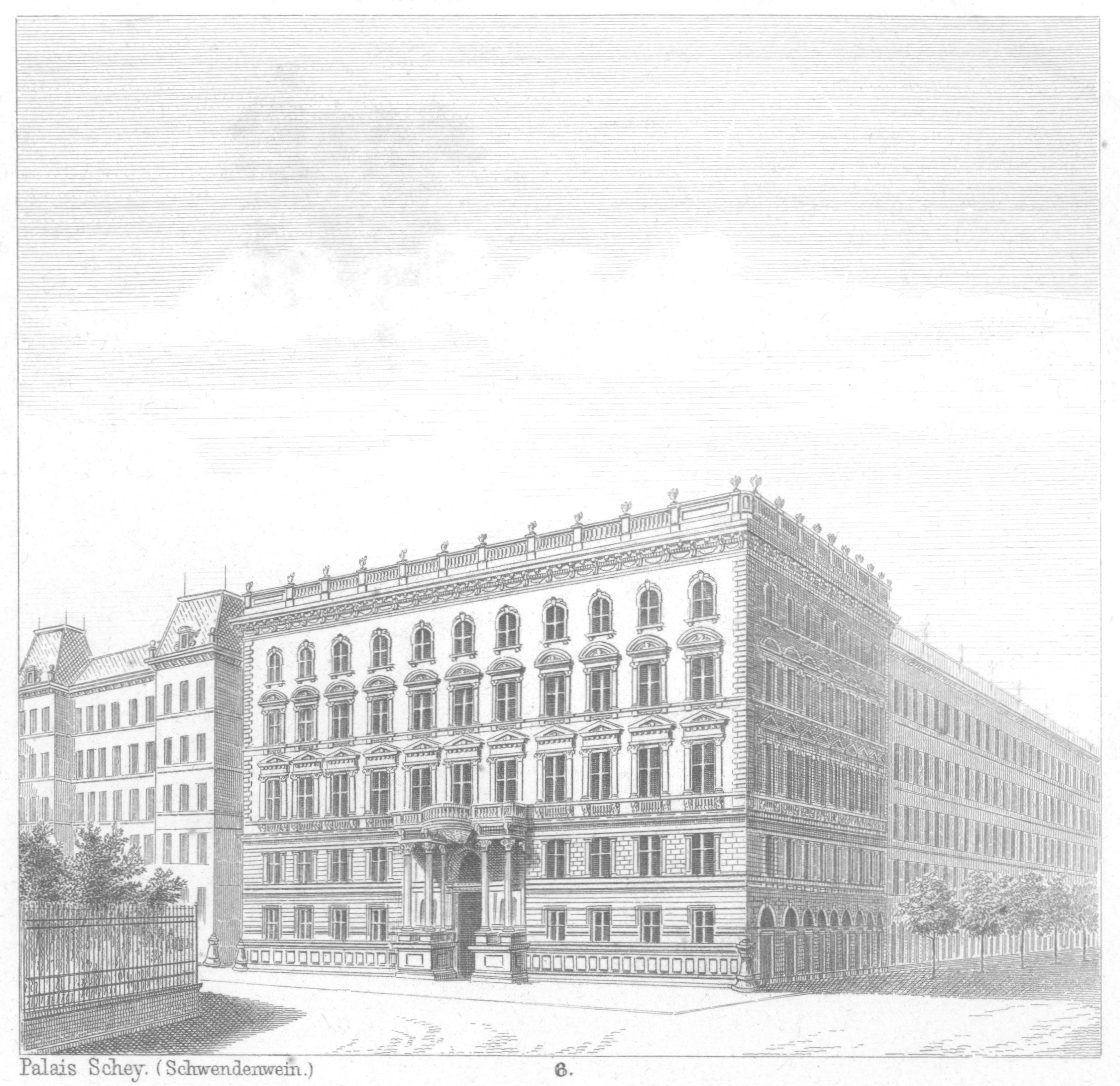 Palais Schey in Wien erbaut 1863/64 nach Plänen von August Schwendewein und für Friedrich Freiherr Schey von Koromla, Bankier und Förderer der Kunst.